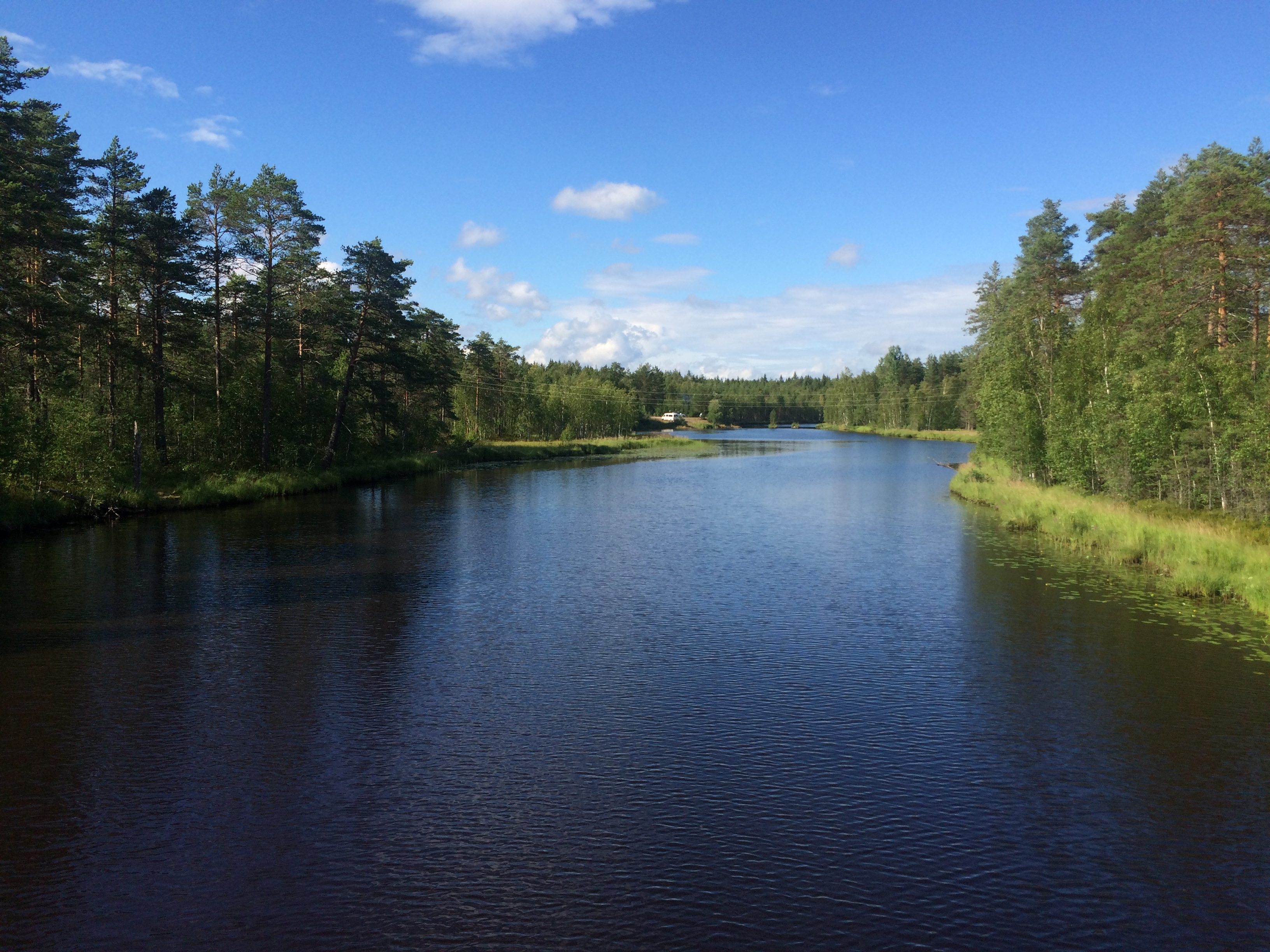 Малая Суна